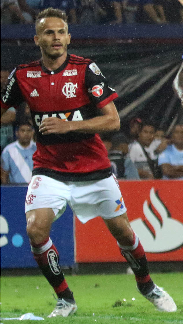 Guayaquil, miércoles 14 de marzo del 2018 (Andes).-En el estadio Capwell en Guayaquil, Emelec enfrenta a Flamengo de Brasil en la segunda fecha del grupo D de la Copa Libertadores. Foto:Andes/César Muñoz